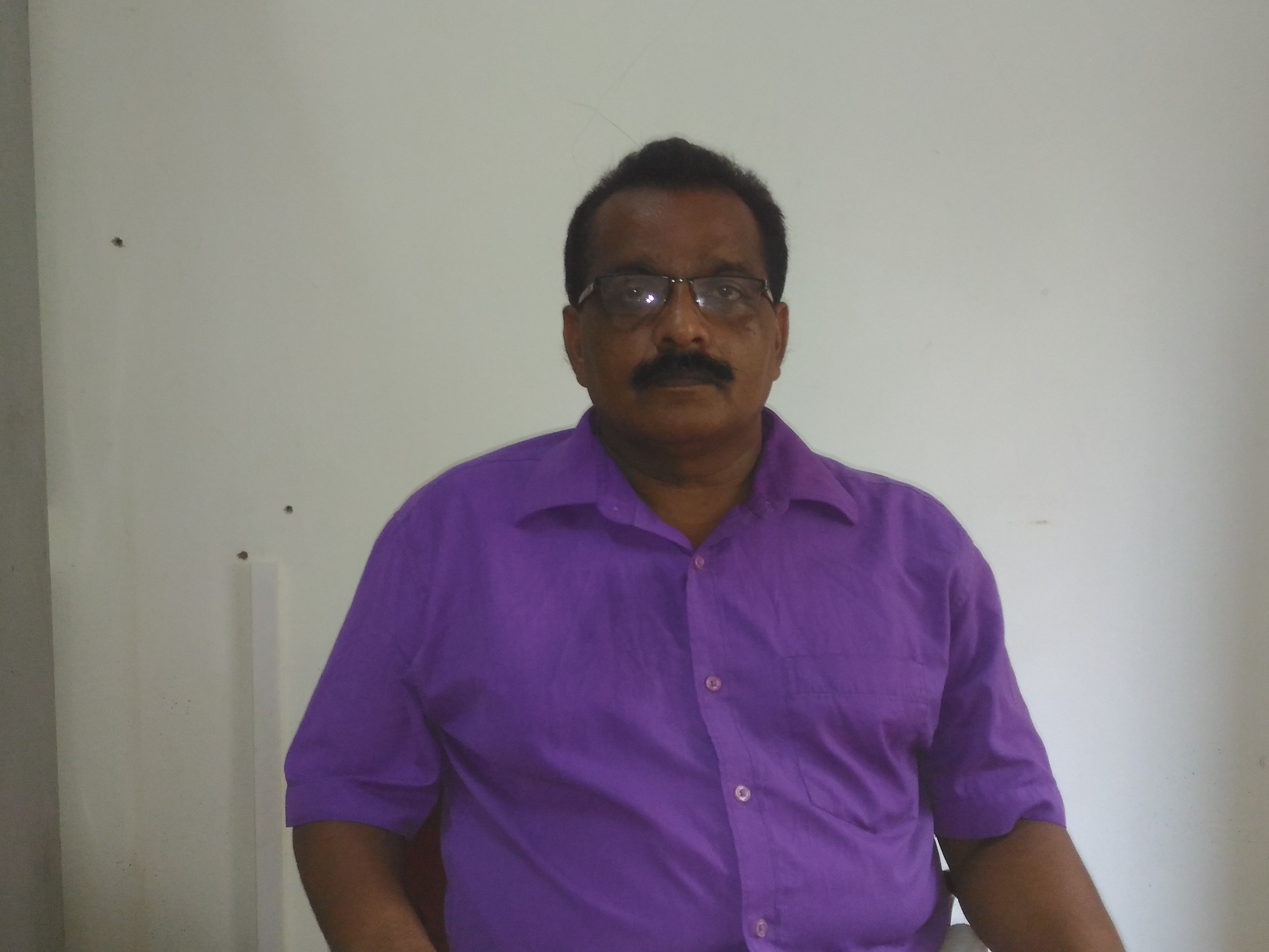 ಕನ್ನಡ: professer and folklorist